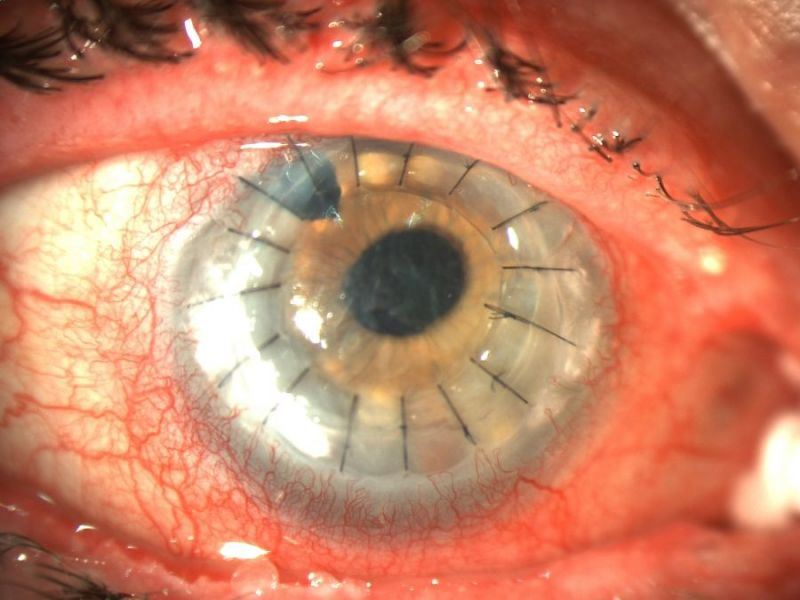 frische Keratoplastik Unknown